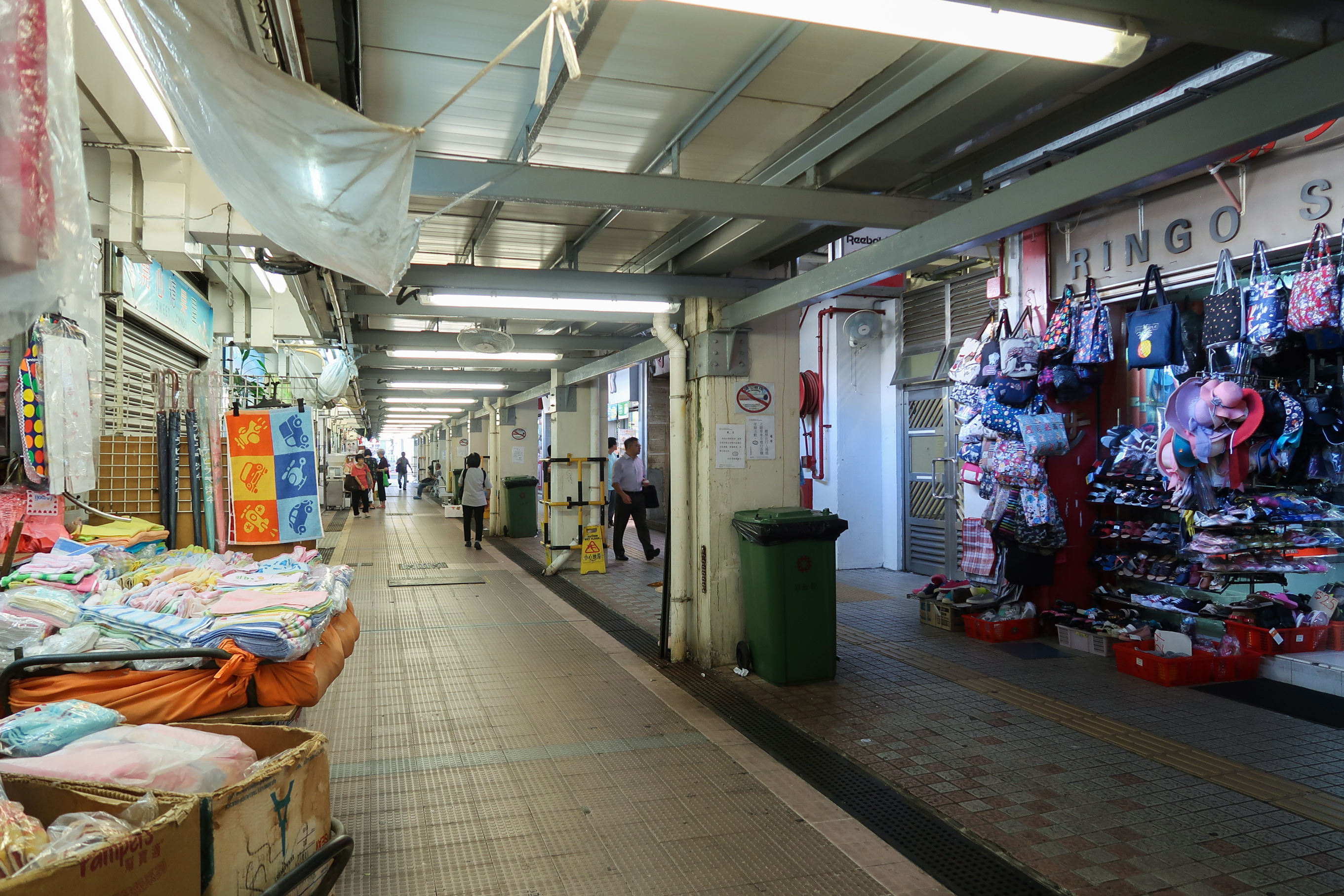 Choi Hung Estate Market